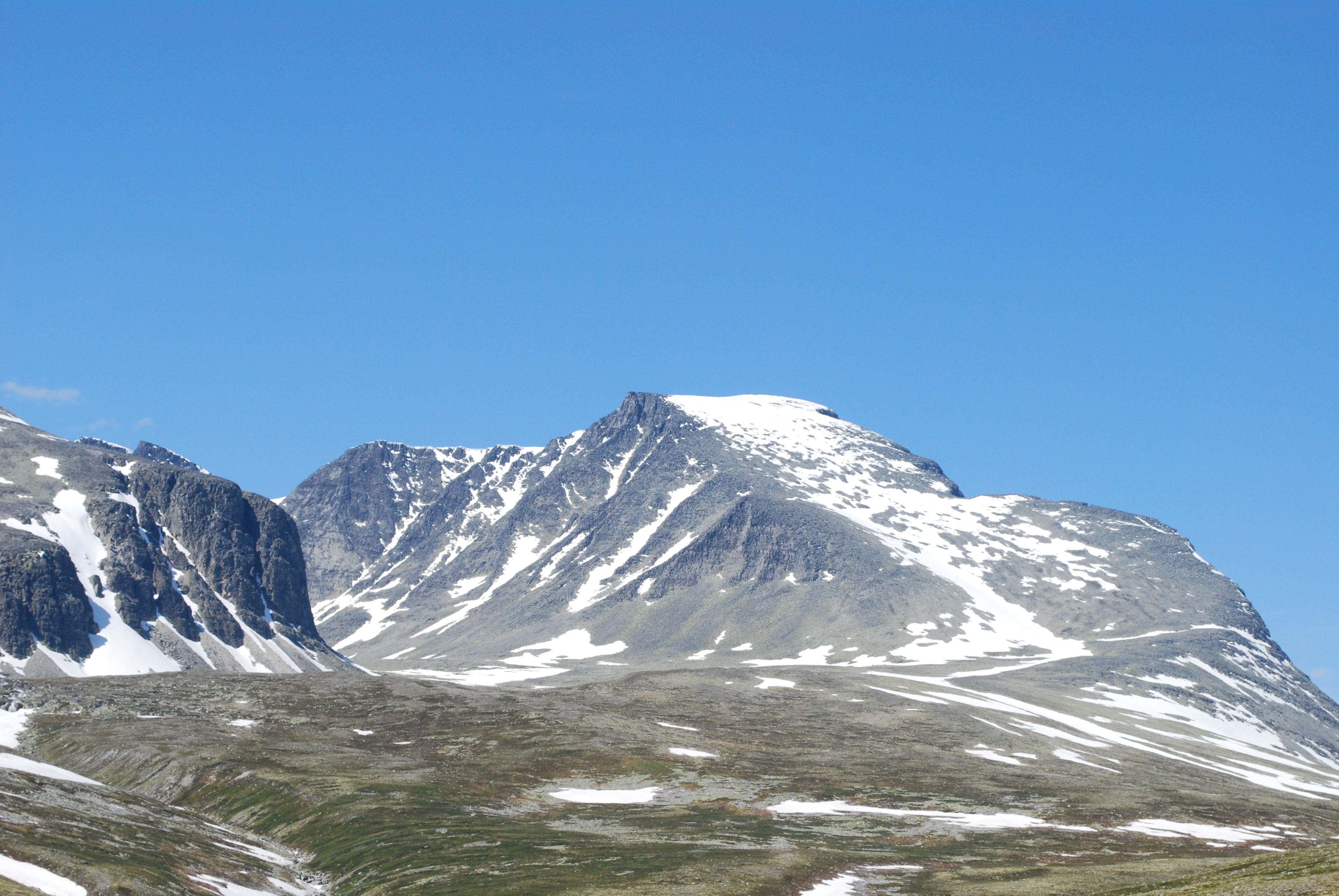 Rondslottet (2178 moh.), den høyeste toppen i fjellområdet Rondane sett fra øst og den merkede turstien langsmed Langglupbekken.